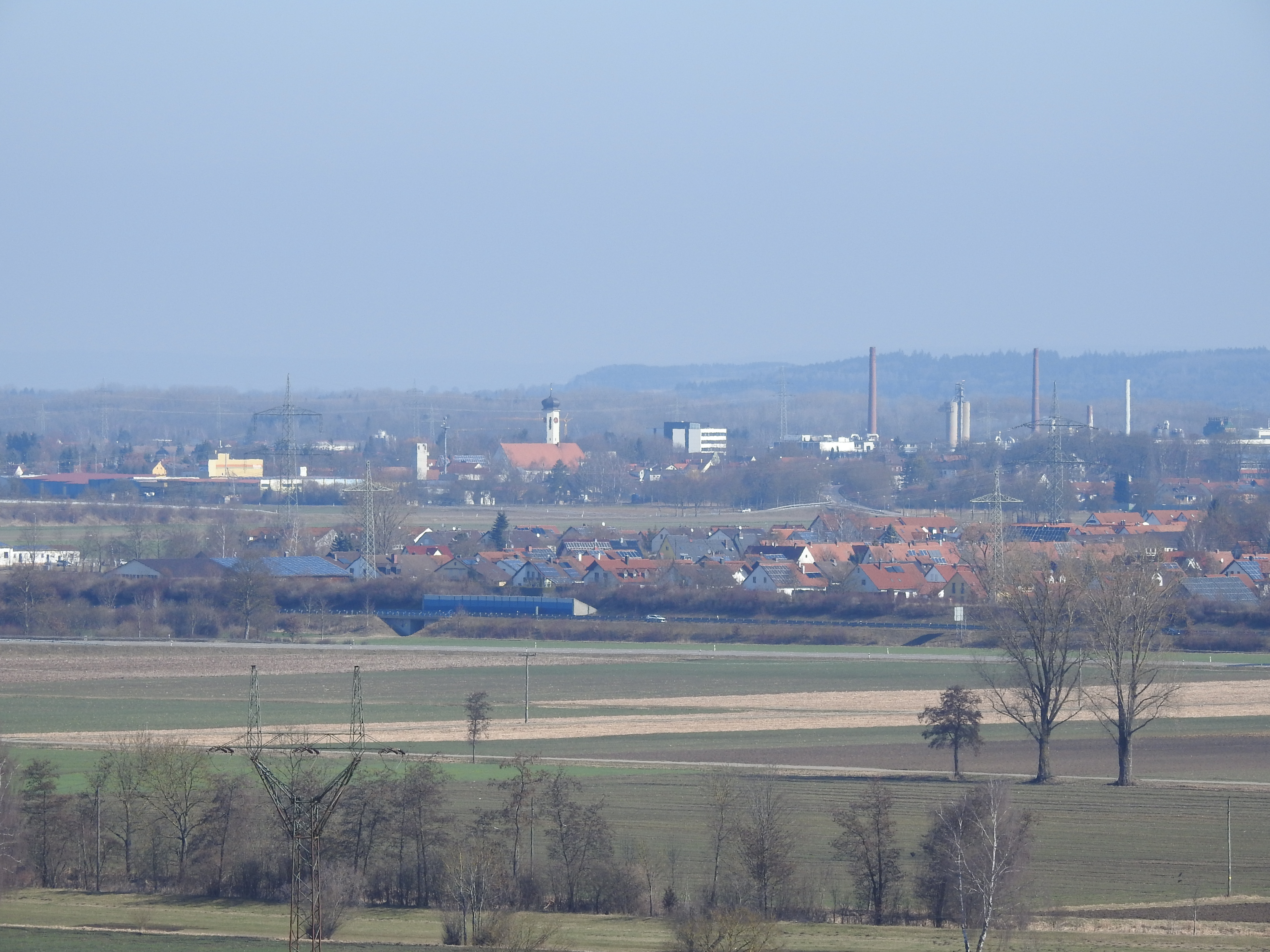 Meitingen von Südwesten, vorne links Deltamast der 110-kV-Leitung Meitingen–Memmingen